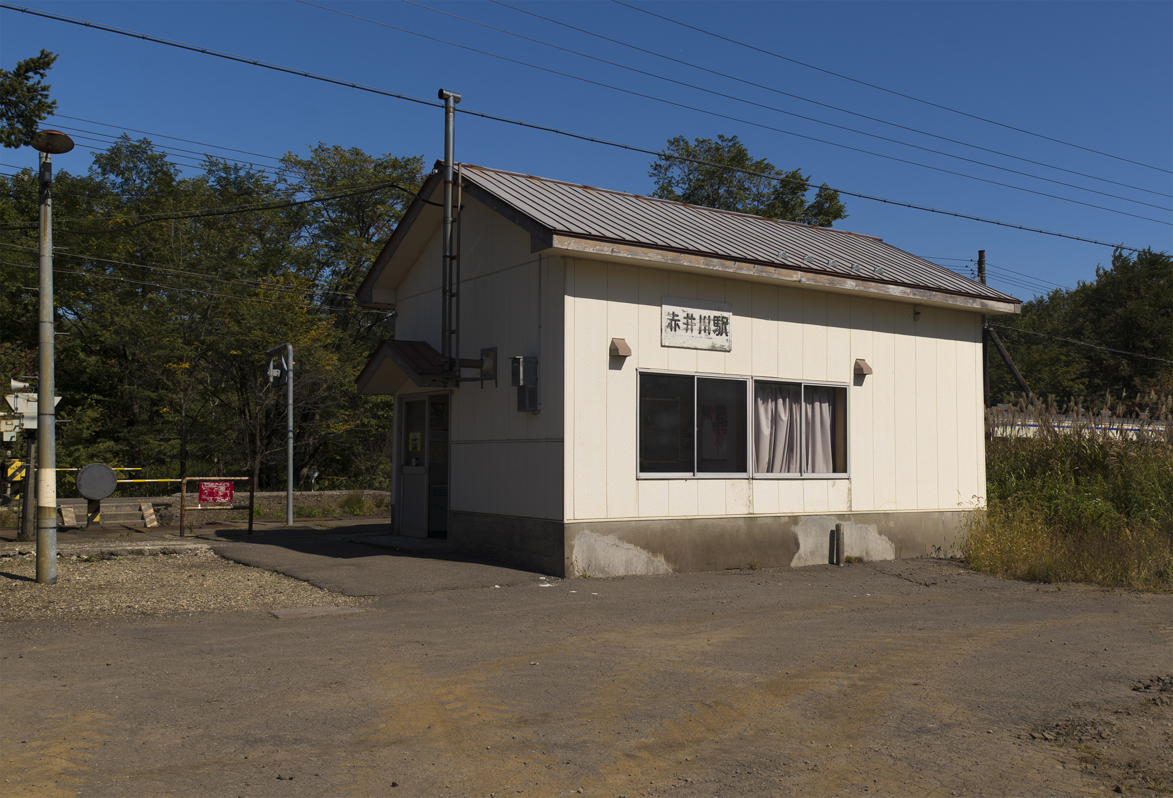 北海道旅客鉄道株式会社函館本線赤井川駅駅舎